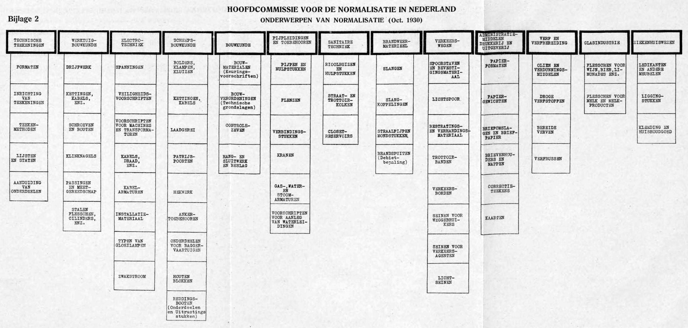 Onderwerpen van normalisatie, 1930